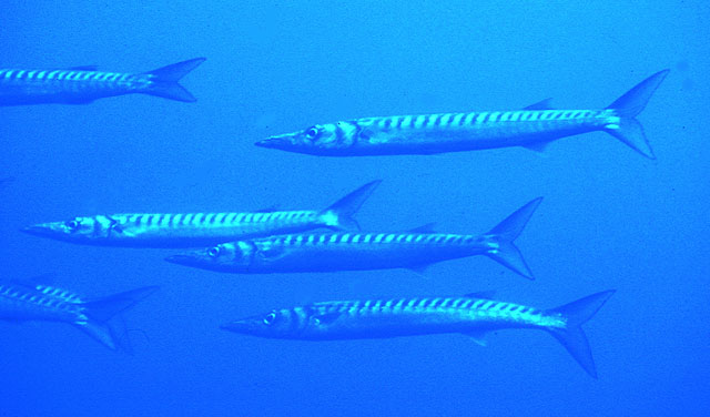 Sphyraena viridensis (Cuvier, 1829)